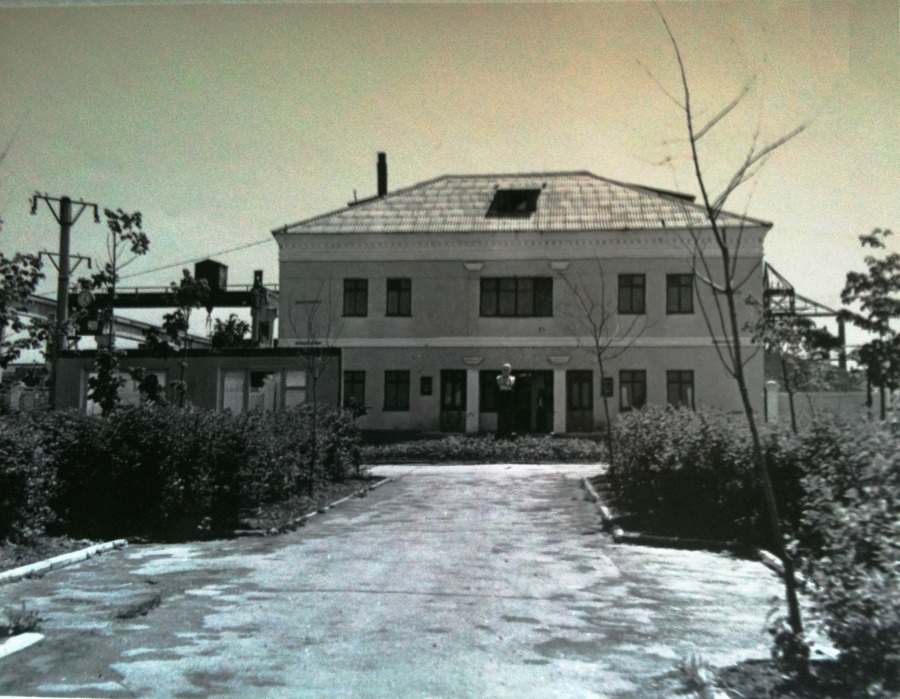 Административное здание ДДСК